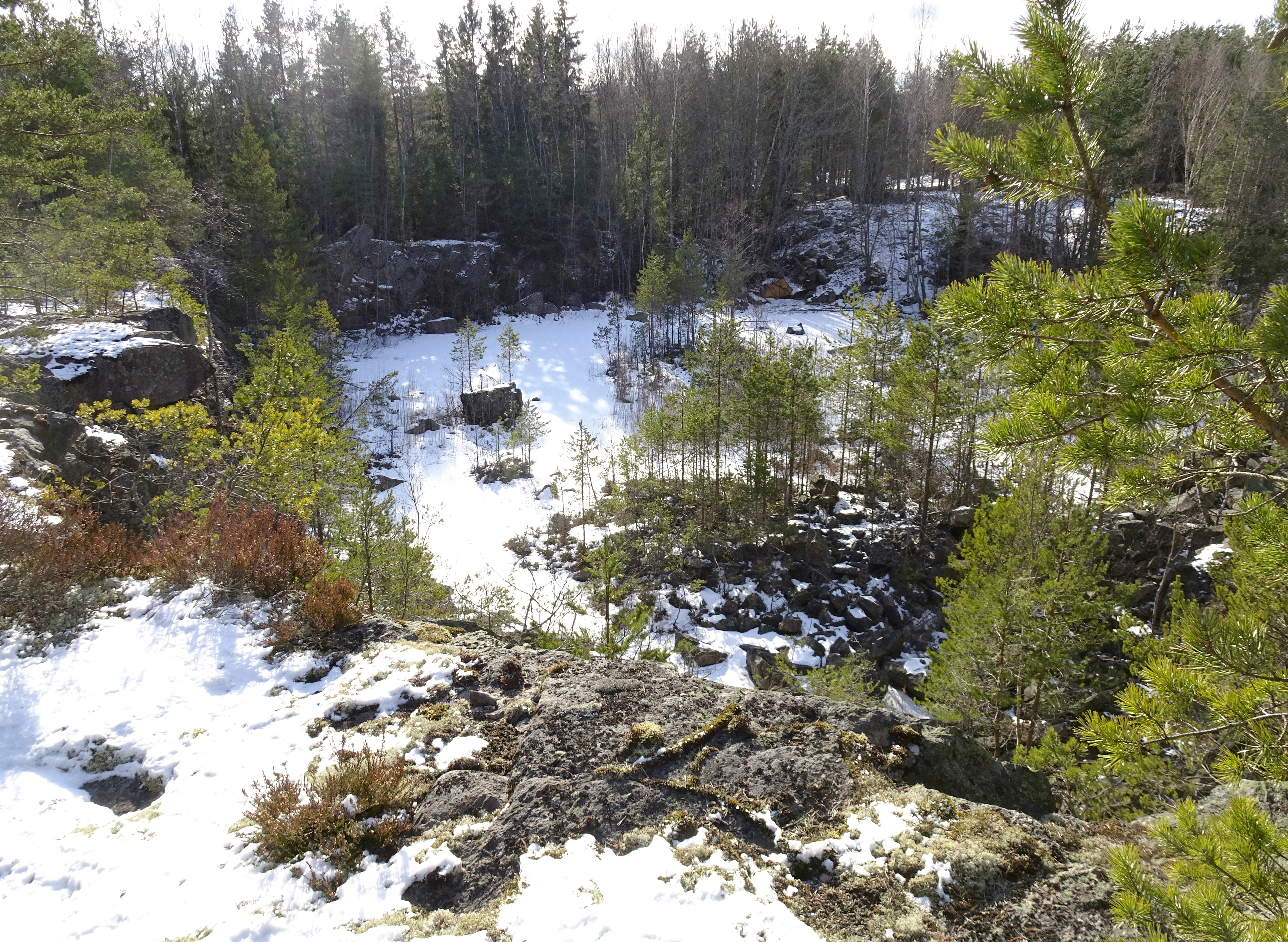 Huddinge gruva i Flemingsbergsskogen